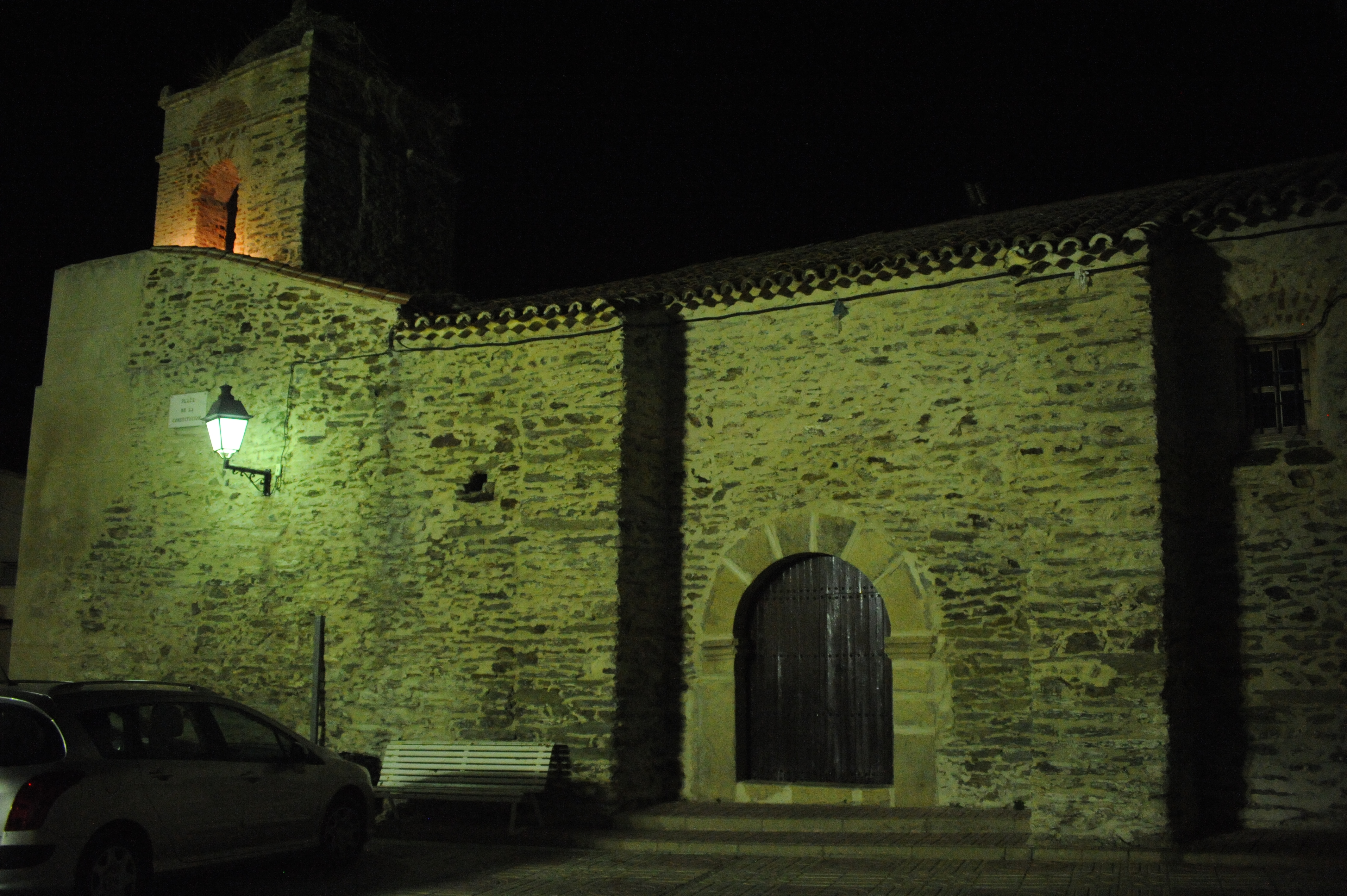 Iglesia parroquial de Portaje, Cáceres